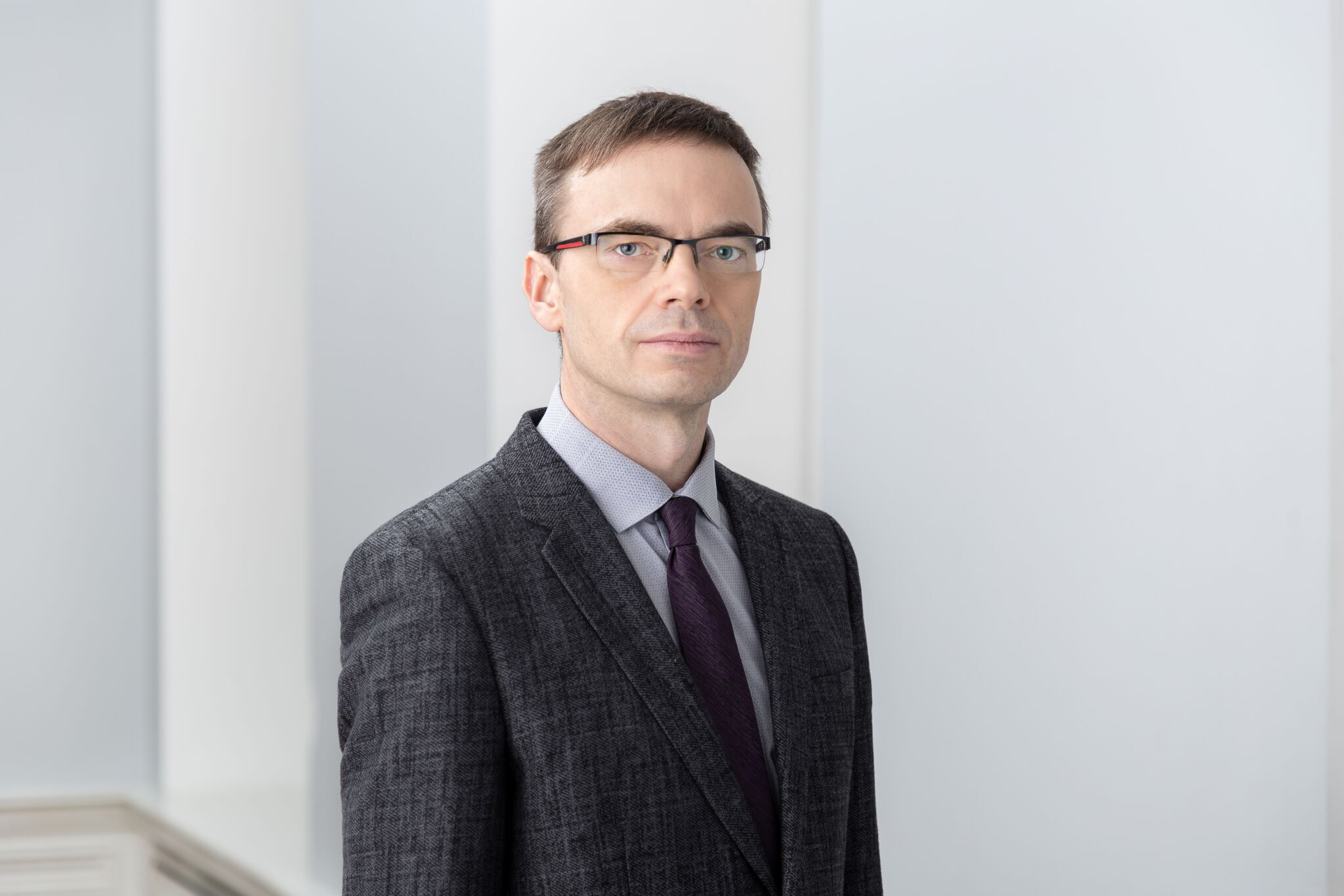 Sven Mikser